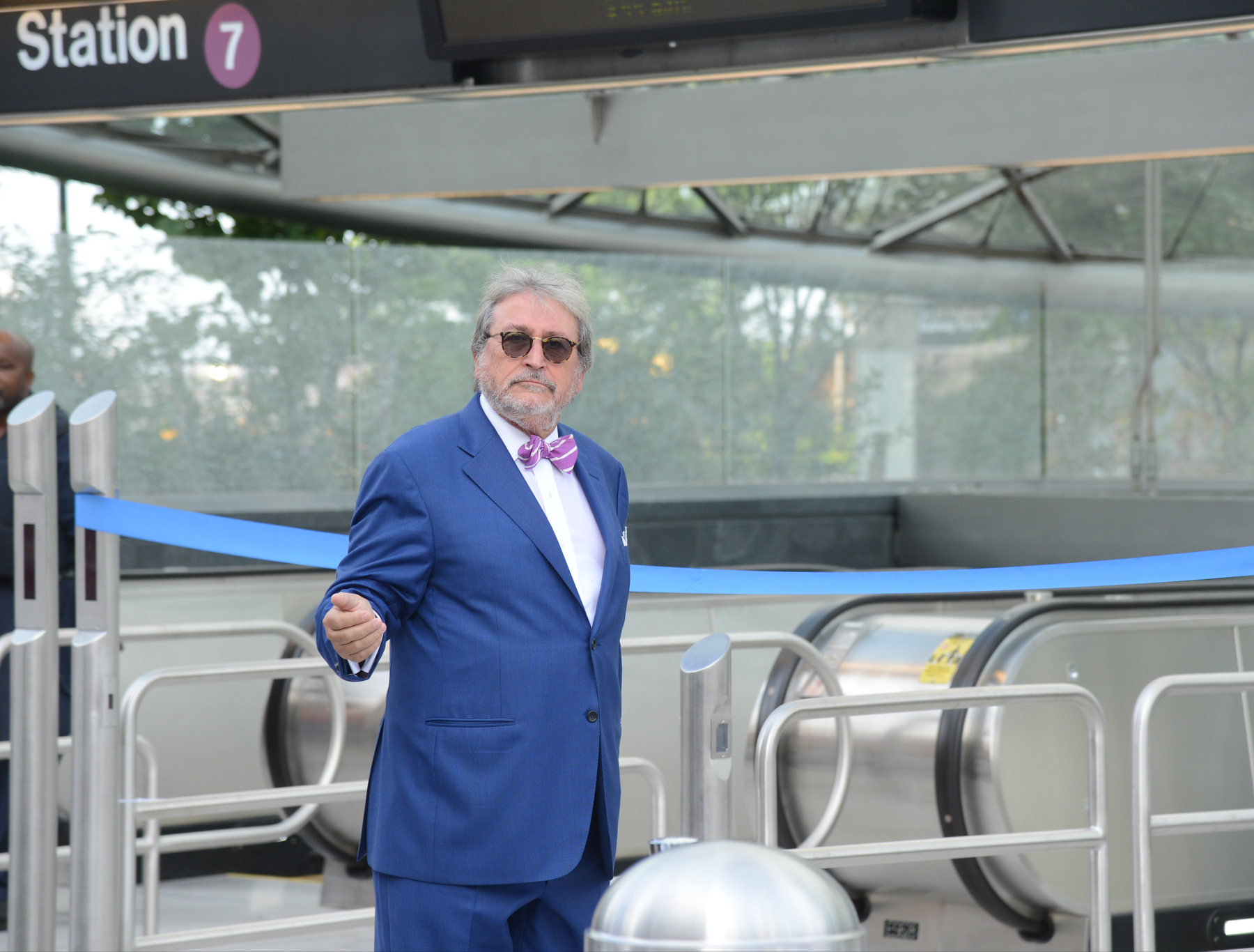 34 St-Hudson Yards Opening